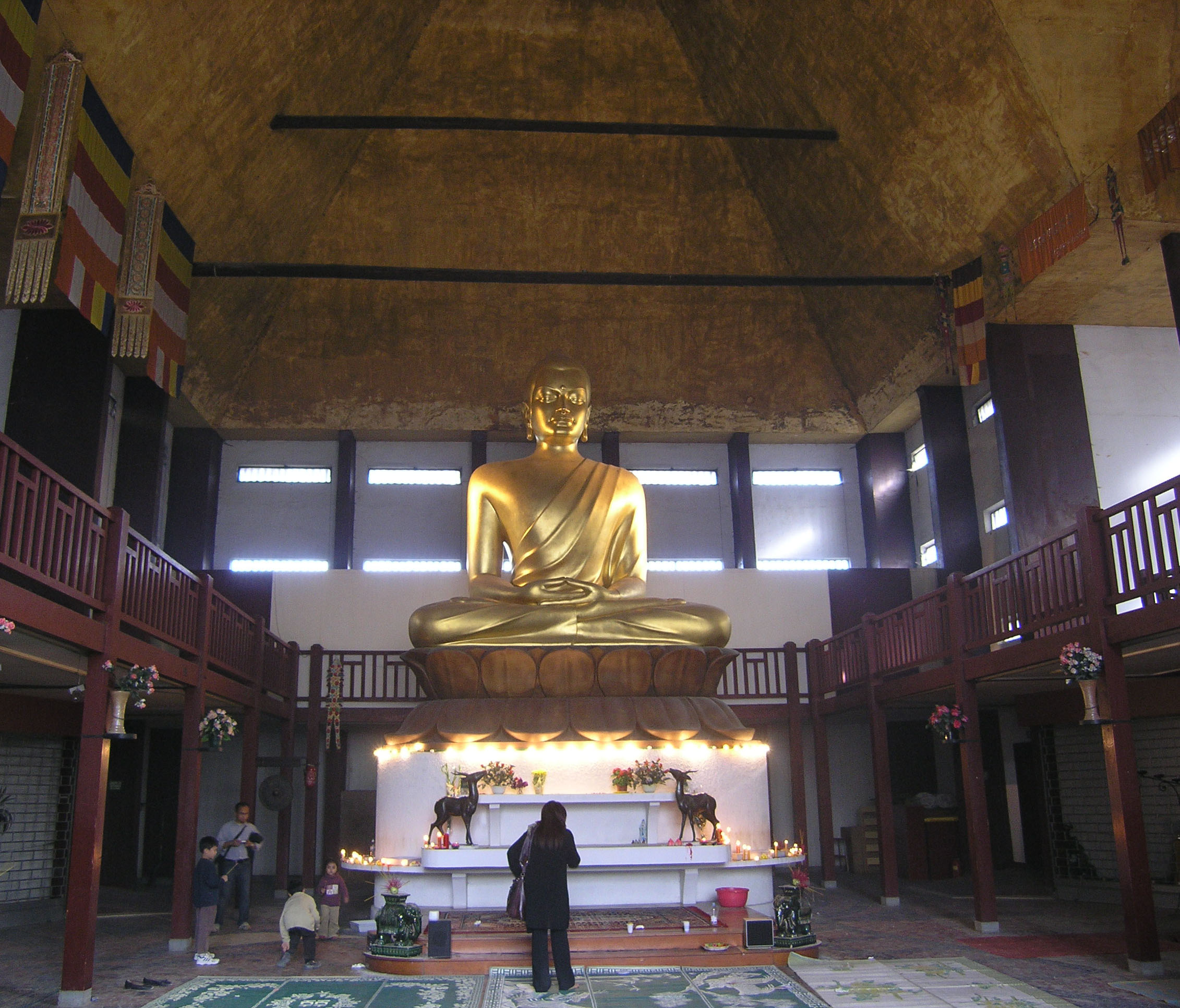 Der grosse Buddha der Pagode des Bois de Vincennes